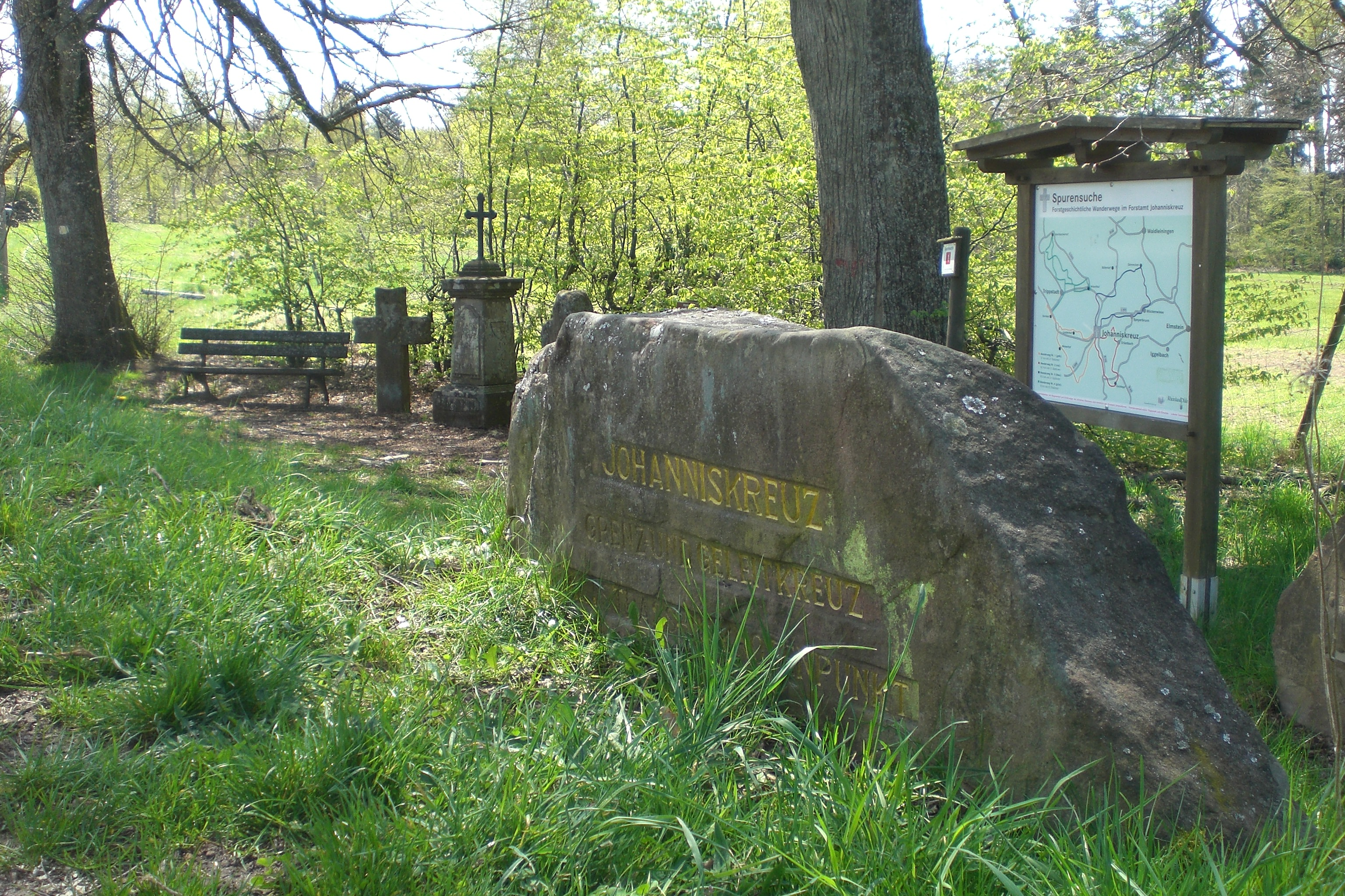 Ritterstein "Johanniskreuz" vor den drei Steinkreuzen